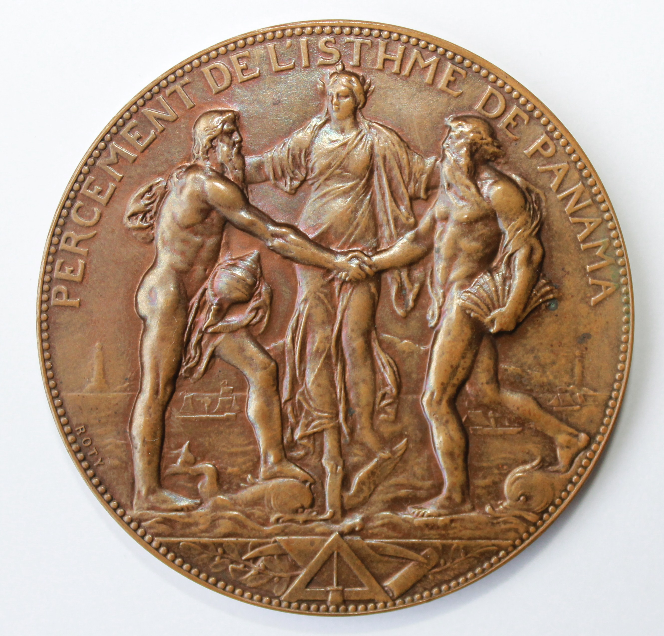 Médaille du percement de l'isthme de Panama réalisée en 1881 par le graveur Oscar Roty. La Fortune réunit deux vieillards personnifiant l'Océan Atlantique et l'Océan Pacifique. (Bronze 56 mm collection personnelle)